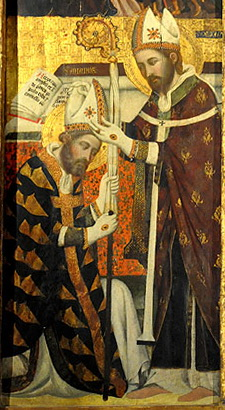 Retaule de Sant Marc i Sant Anià, obra d'Arnau Bassa (1346). Actualment a la Seu de Manresa. Taula central amb la Consagració de Sant Anià per part de Sant Marc